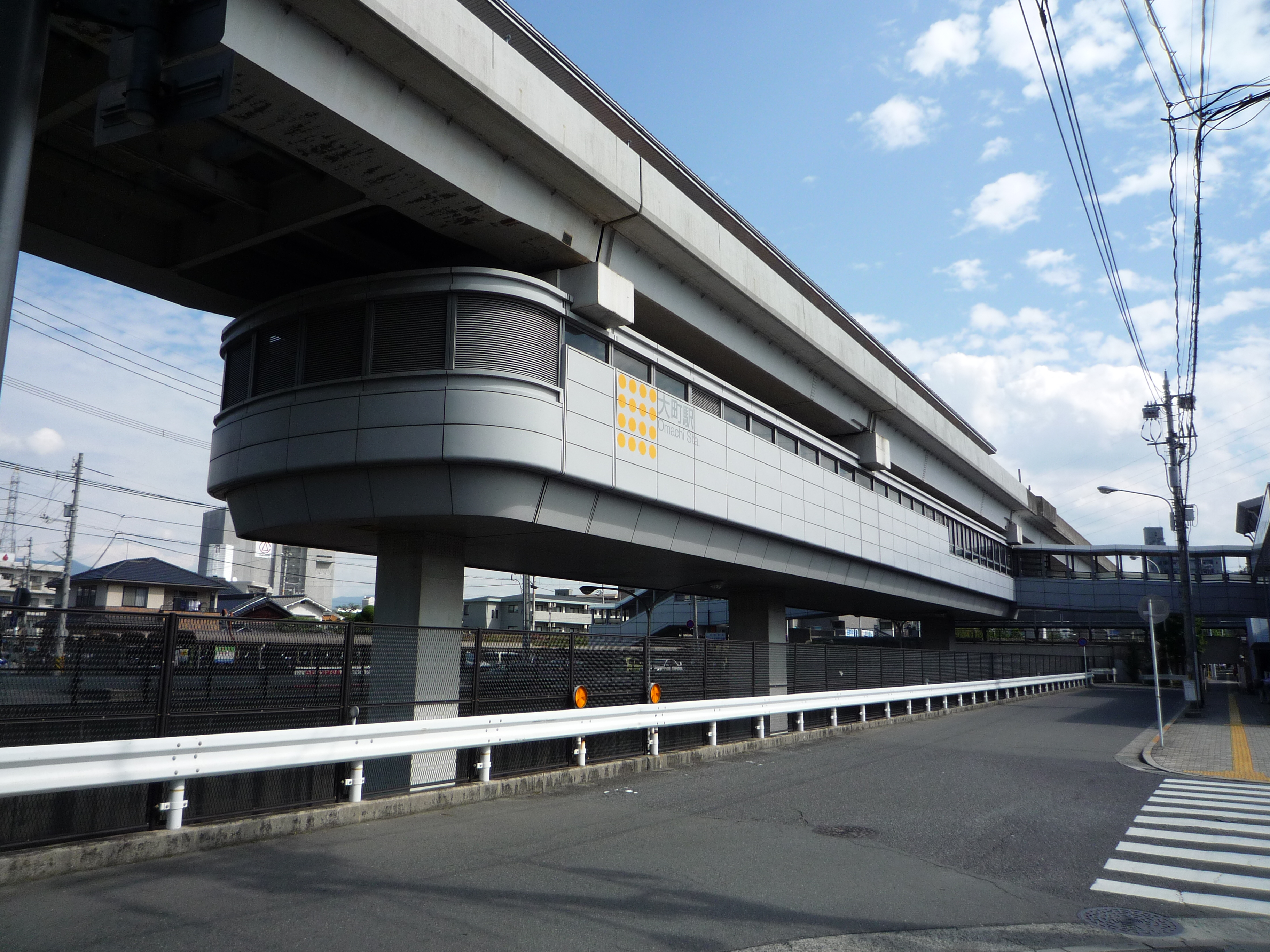 大町駅 (広島県)